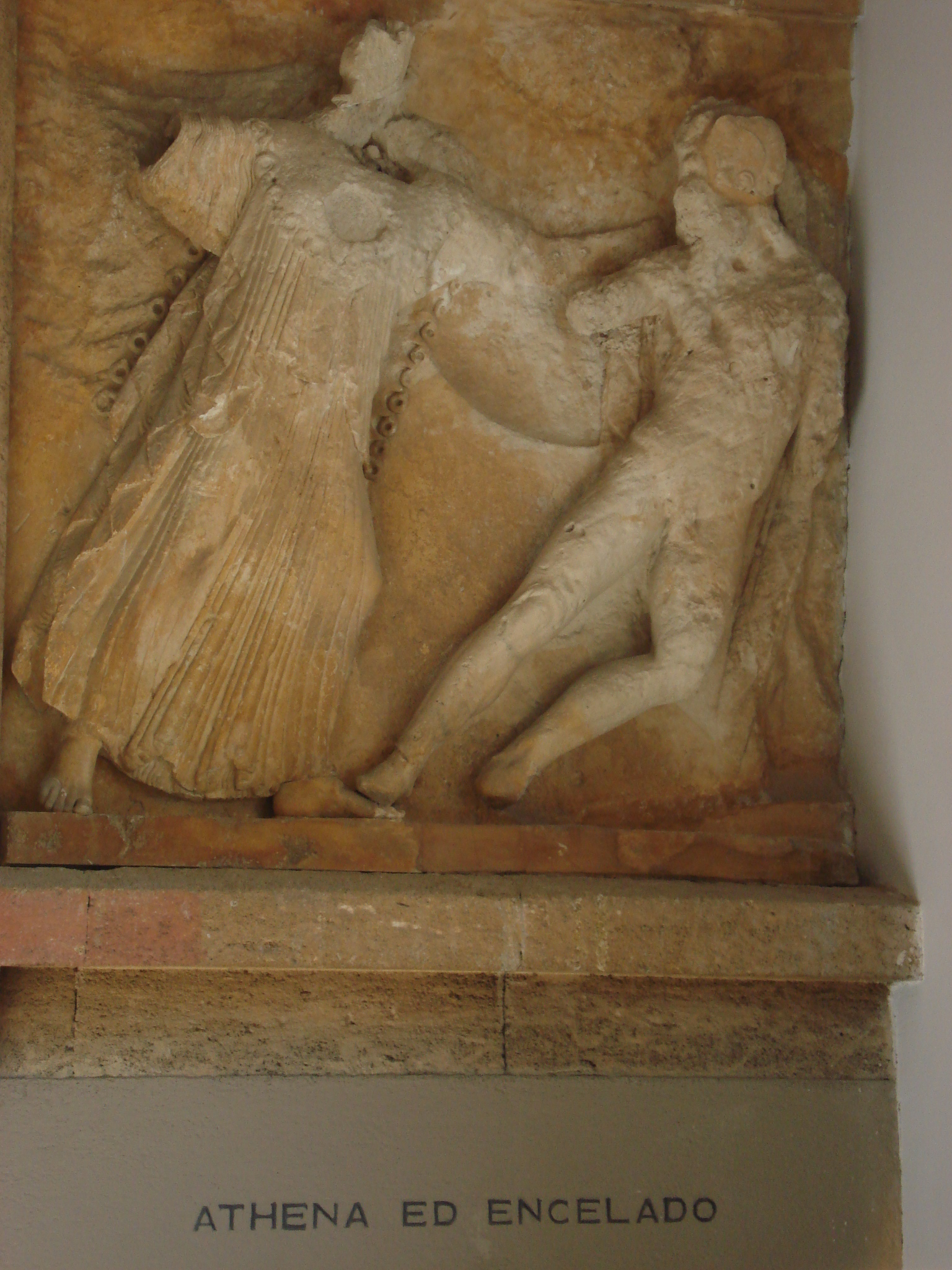 Dal Tempio E di Selinunte: Atena ed Encelado (gigante ucciso nella battaglia contro gli dèi, seppellito dalla dea sotto l'Etna). Ca. 450 a.C. Museo archeologico regionale di Palermo, 28 settembre 2006. Foto di Giovanni Dall'Orto.